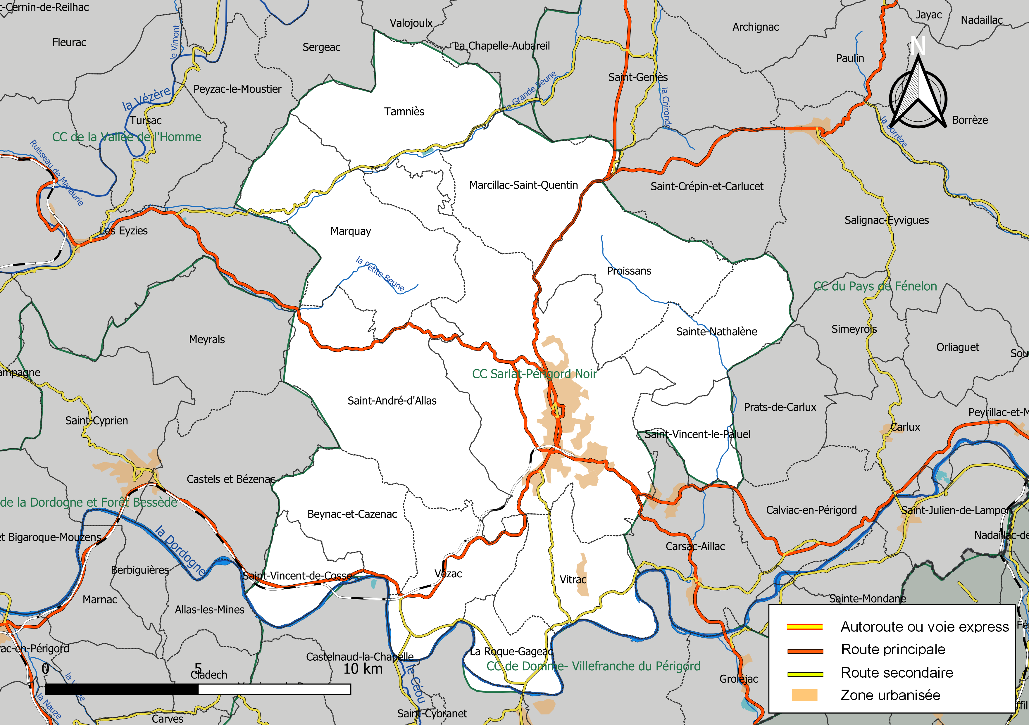 Carte géographique de la Communauté de communes Sarlat-Périgord noir, département de la Dordogne, France. Composition au 1er janvier 2019.